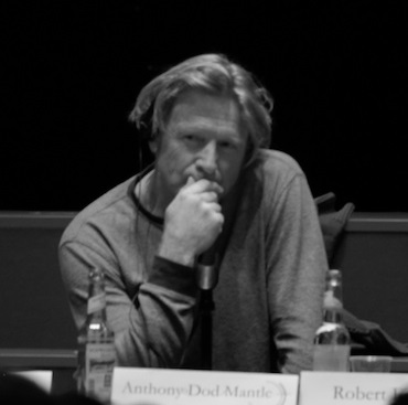 Anthony Dod Mantle at Marburger Kameragespräche / Kamerapreis 2011